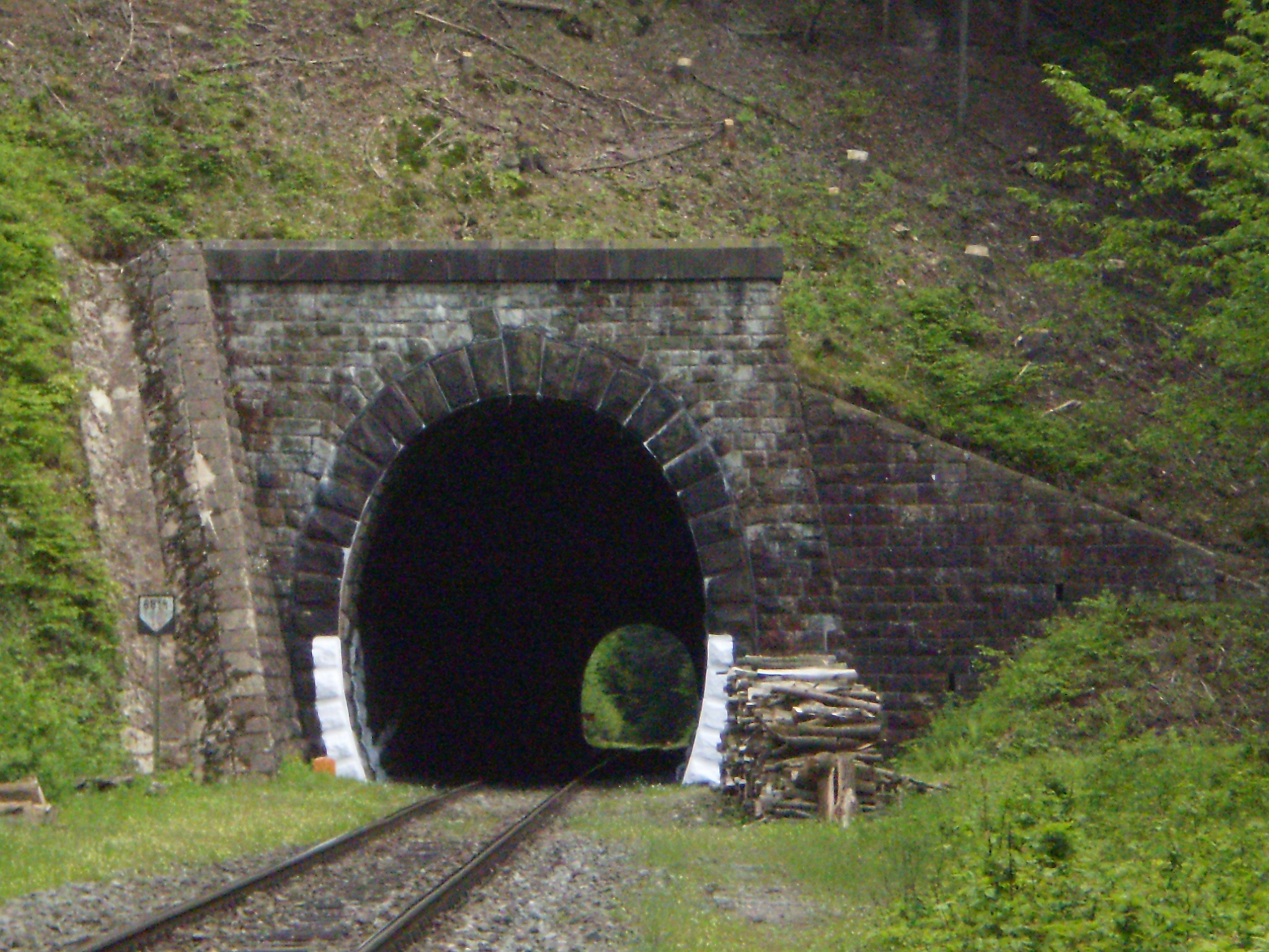 tunel